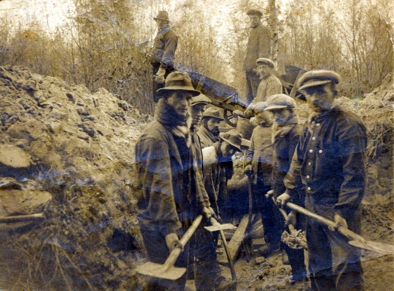 Frans van den Elzen met zijn ploeg poldermannen aan het werk bij het uitgraven van het Wilhelminakanaal onder Lieshout